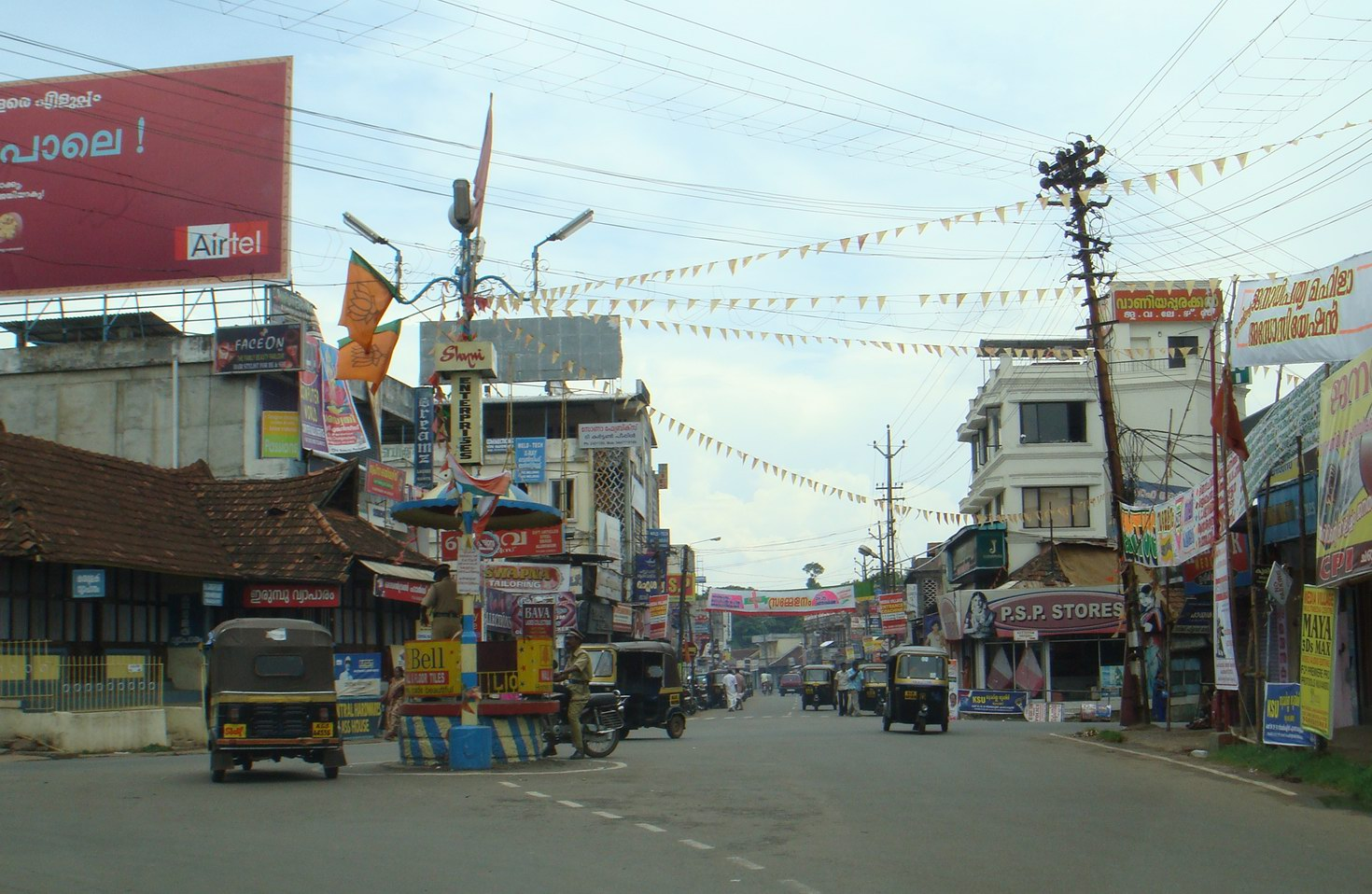 ചങ്ങനാശ്ശേരി